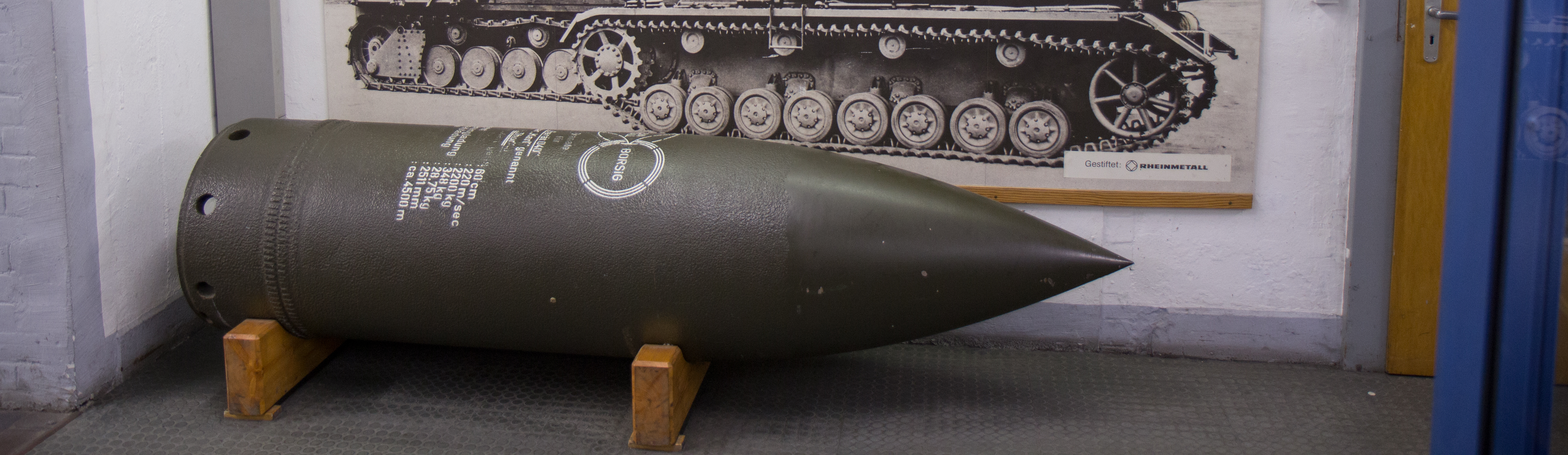 60-cm Granate des Mörsers Karl aufgenommen in der Wehrtechnischen Studiensammlung Koblenz